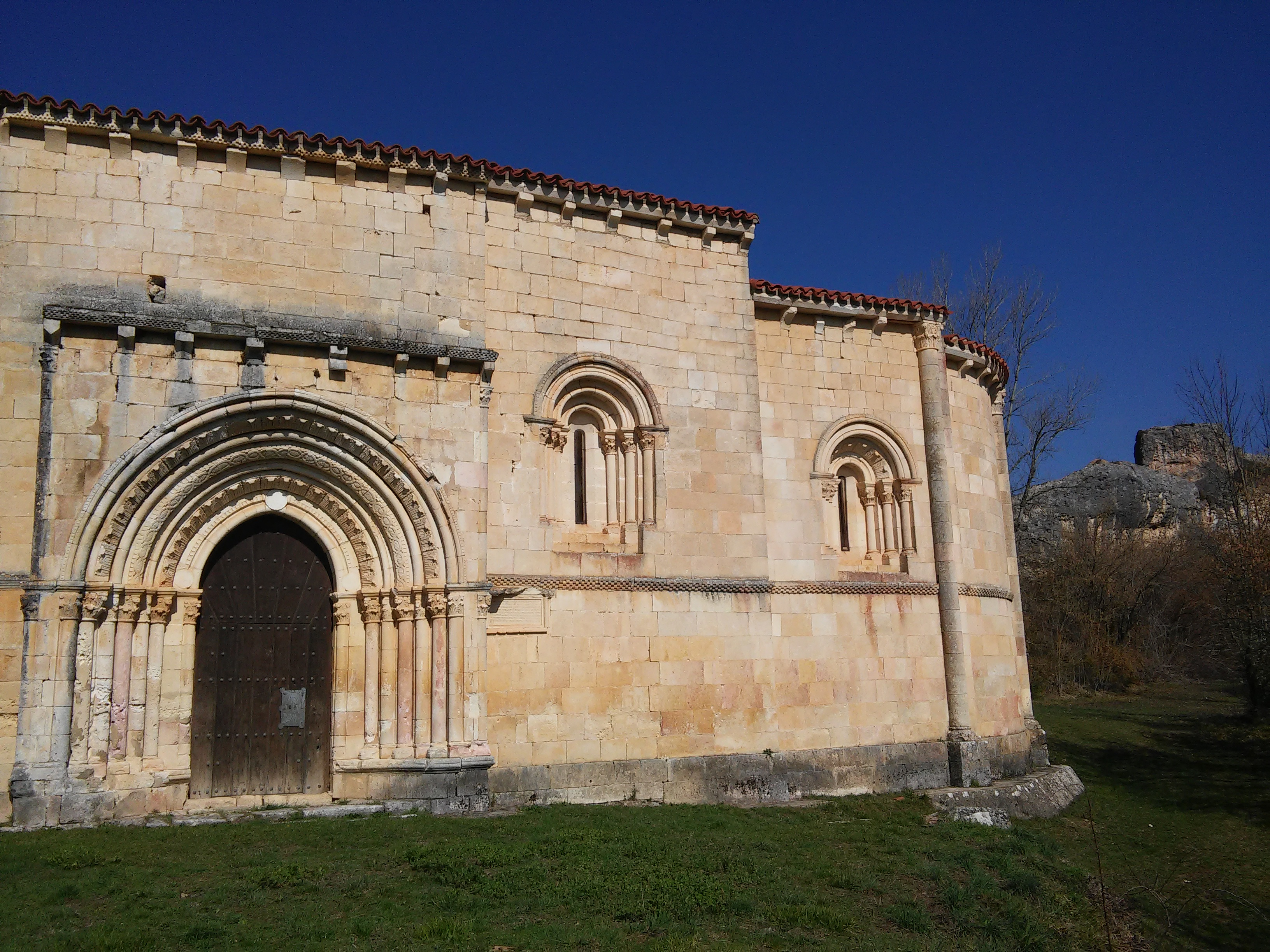 Markiz (Araba) herriko San Joan baseliza